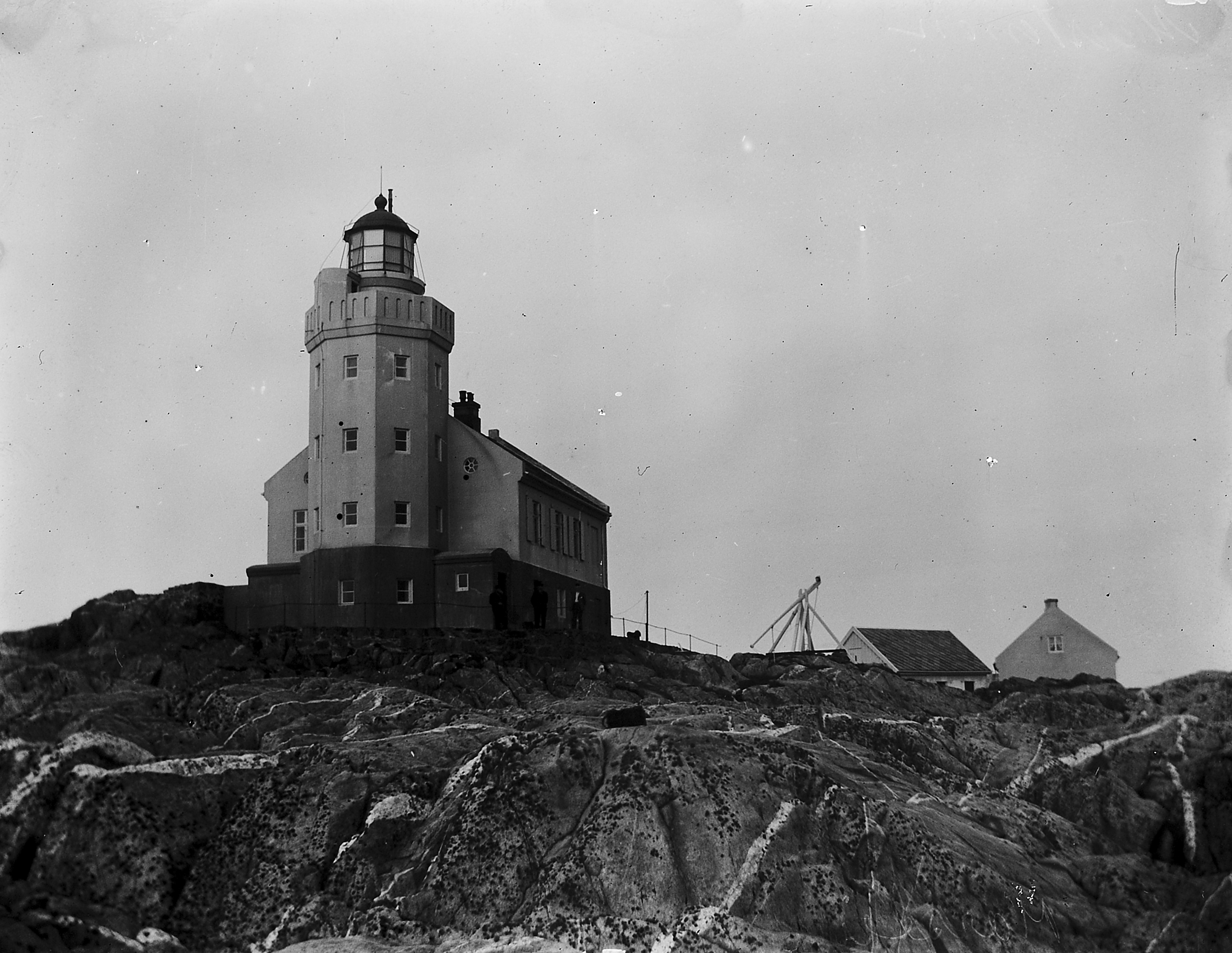 Bildet er hentet fra Arkivverket. Marstein, Austevoll Arkivinstitusjon : Riksarkivet Arkivnavn : Fyrdirektoratet Sted : Norge, Hordaland, Austevoll, Marstein Emneord: Fyr, Kyst Avbildet